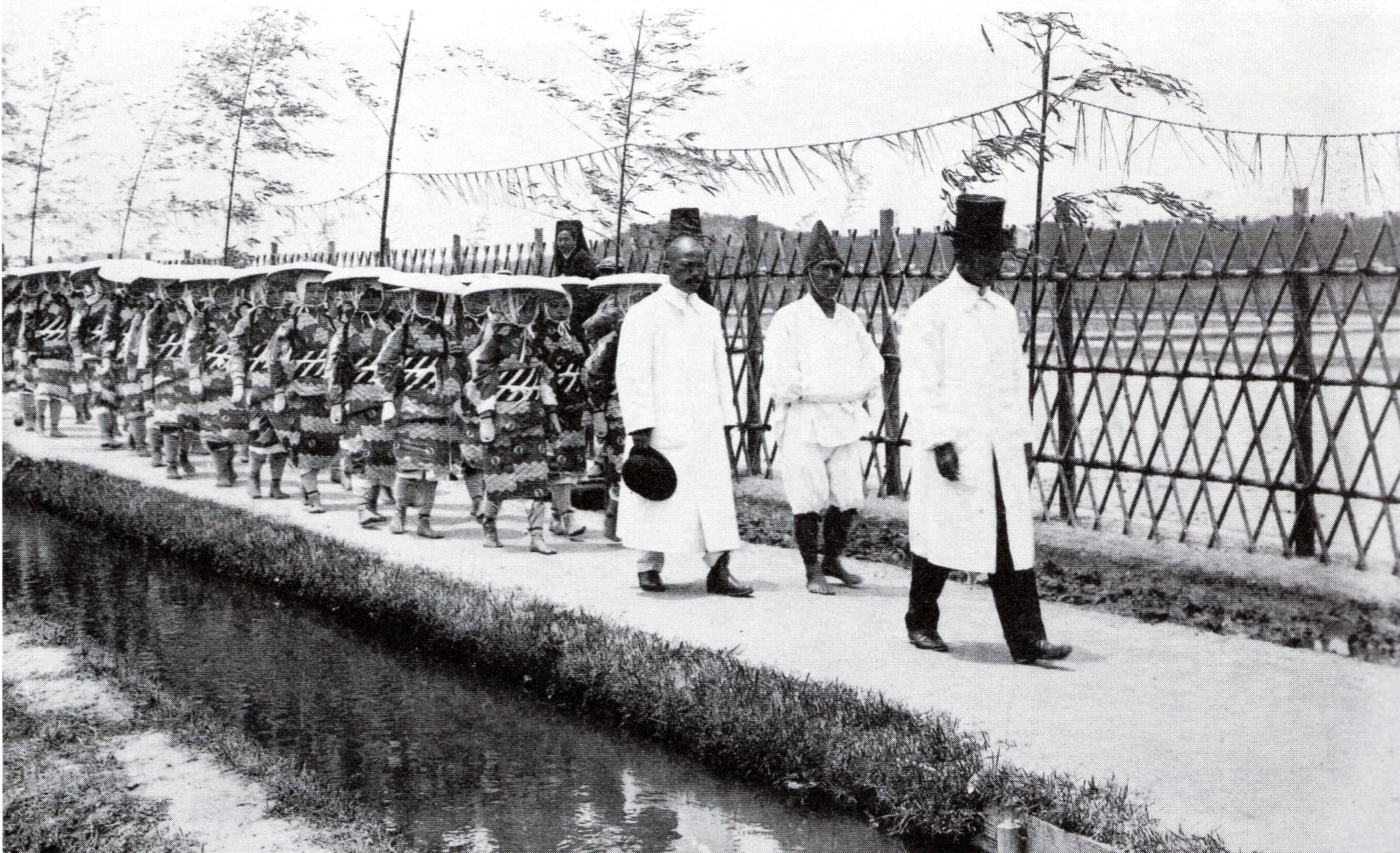 六ツ美悠紀斎田お田植えまつり。愛知県碧海郡六ツ美村大字下中島（現・岡崎市中島町）。